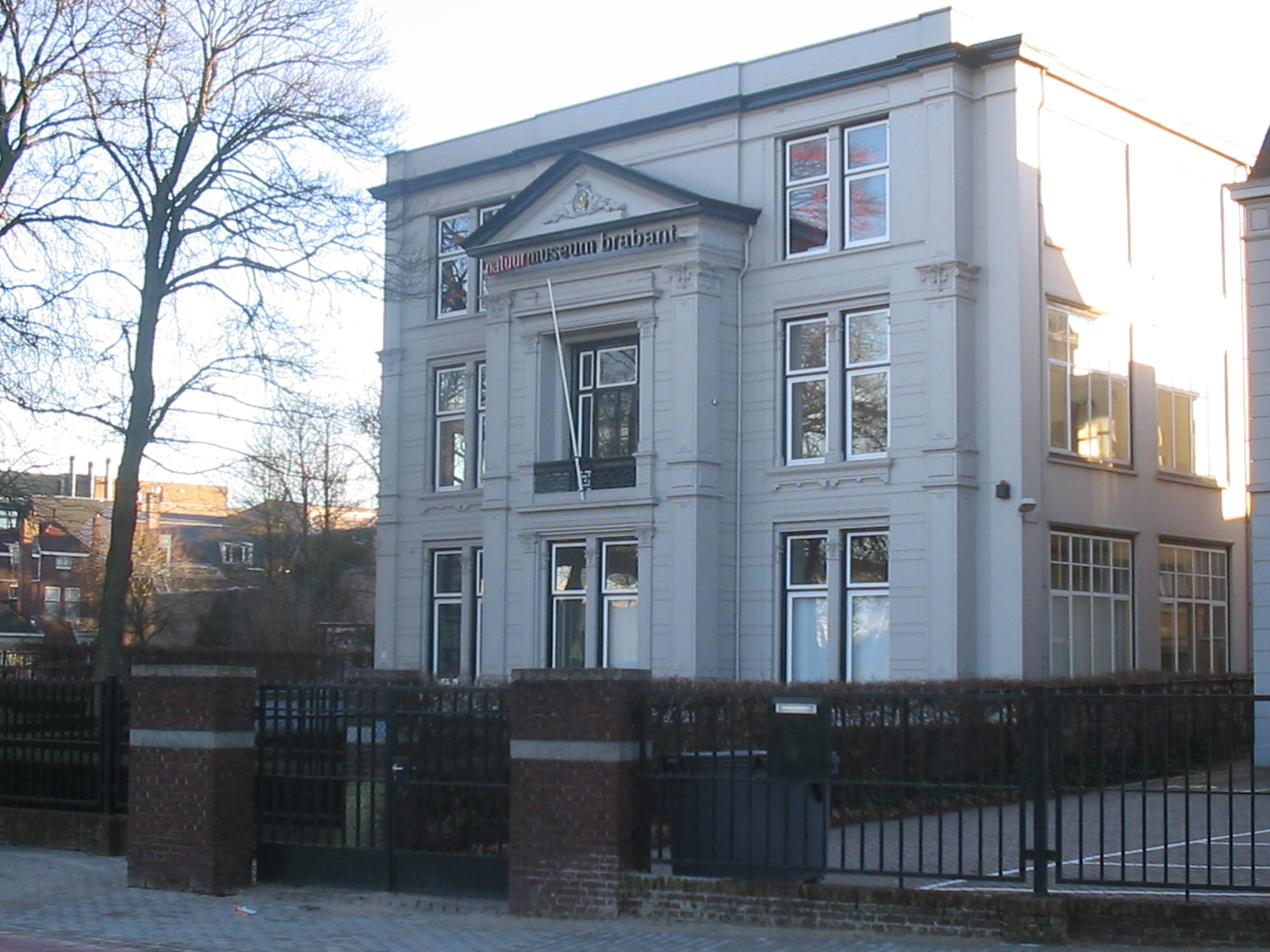 Zicht op de voorzijde van het Natuurmuseum Brabant gevestigd aan de Spoorlaan 434, nabij Centraal Station Tilburg. Niet ver gelegen van het centrum van Tilburg.